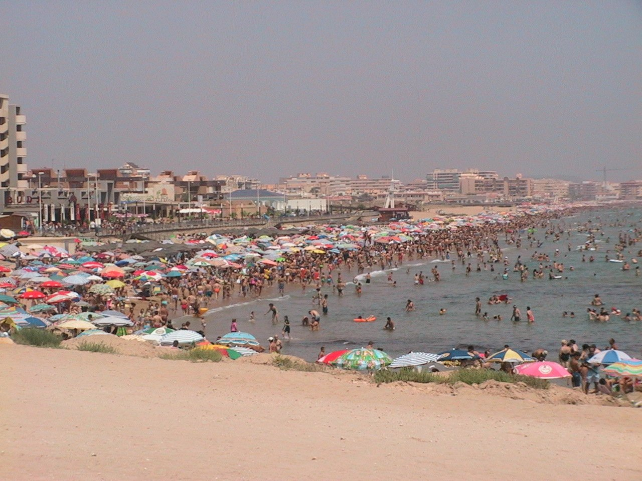 La Mara beach